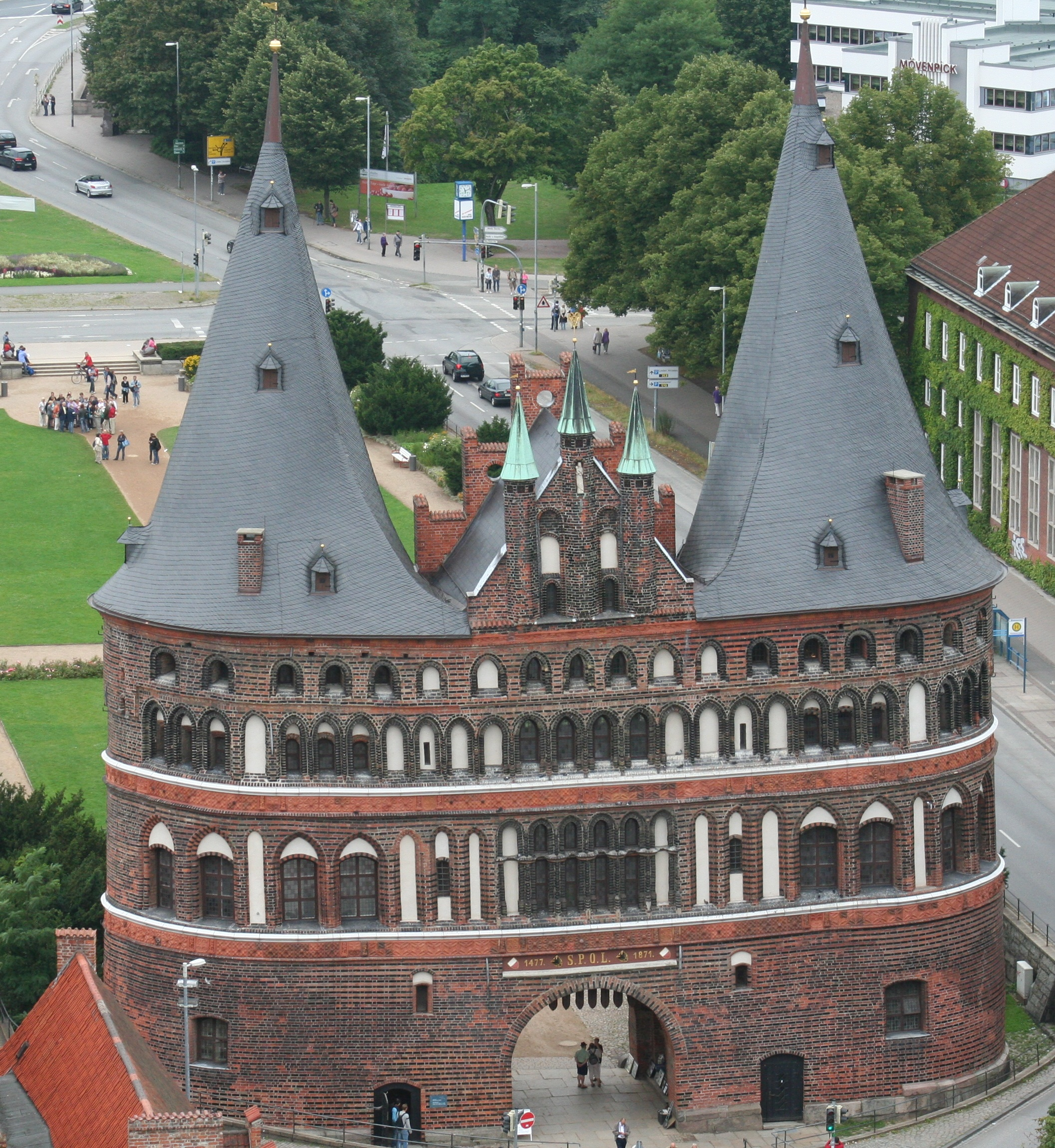 Das Holstentor (Holstein-Tor) in Lübeck vom Turm der Petri-Kirche